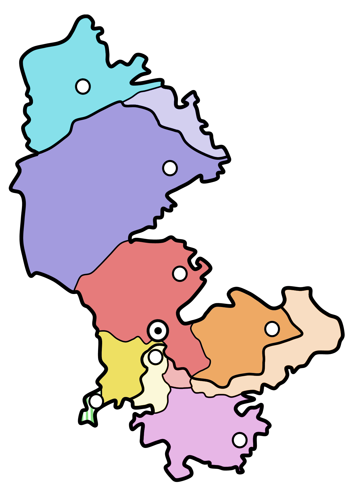 Административно-территориальное деление Нагорно-Карабахской Республики. Тёмным показаны территории, контролируемые Азербайджаном, прочие контролируются Нагорно-Карабахской Республикой.